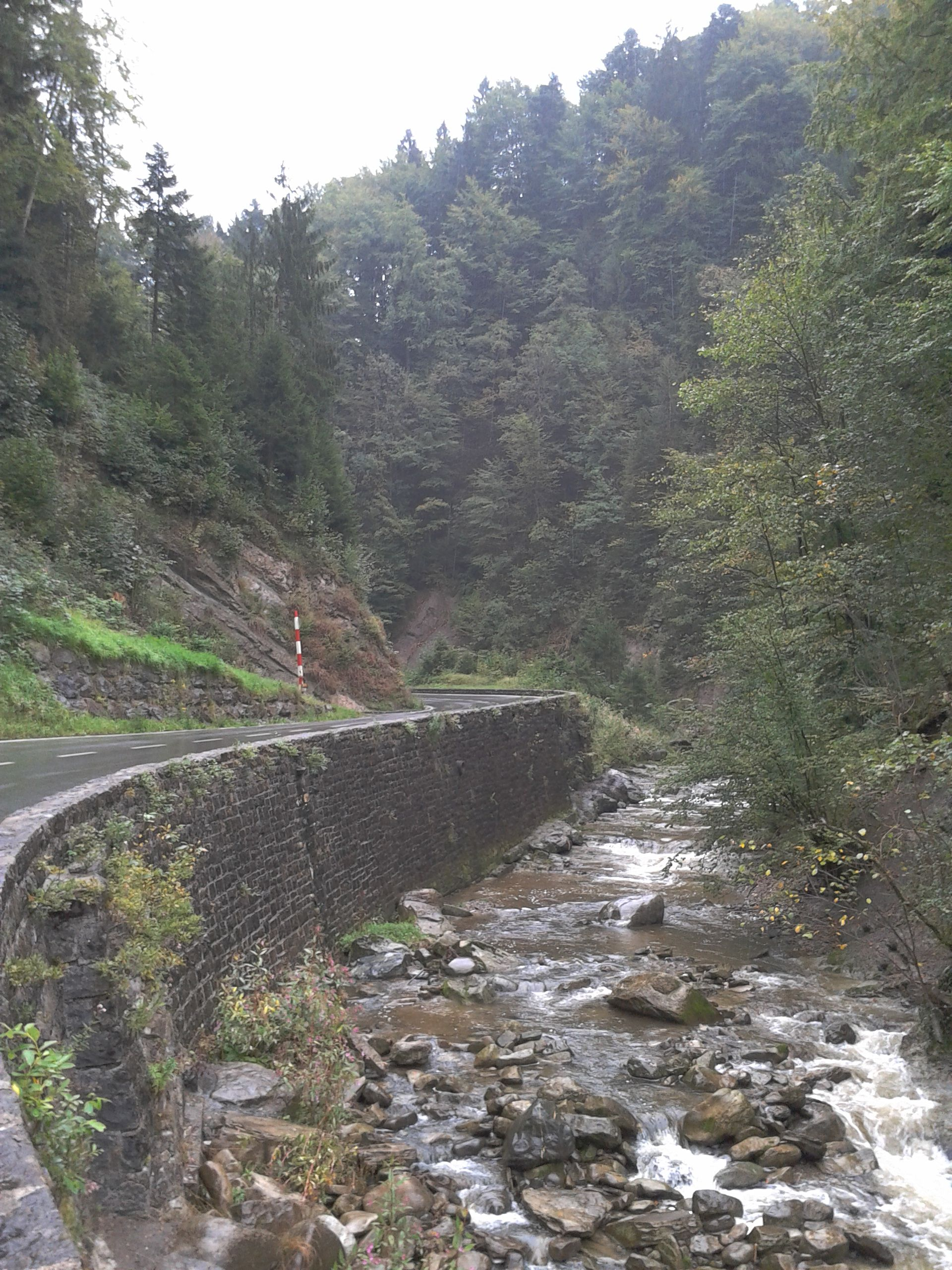 Schwarzach (Fluss) in der Gemeinde Schwarzach (Vorarlberg), Österreich. Ufermauer flussaufwärts Schwarzachtobelstrasse (L 7)